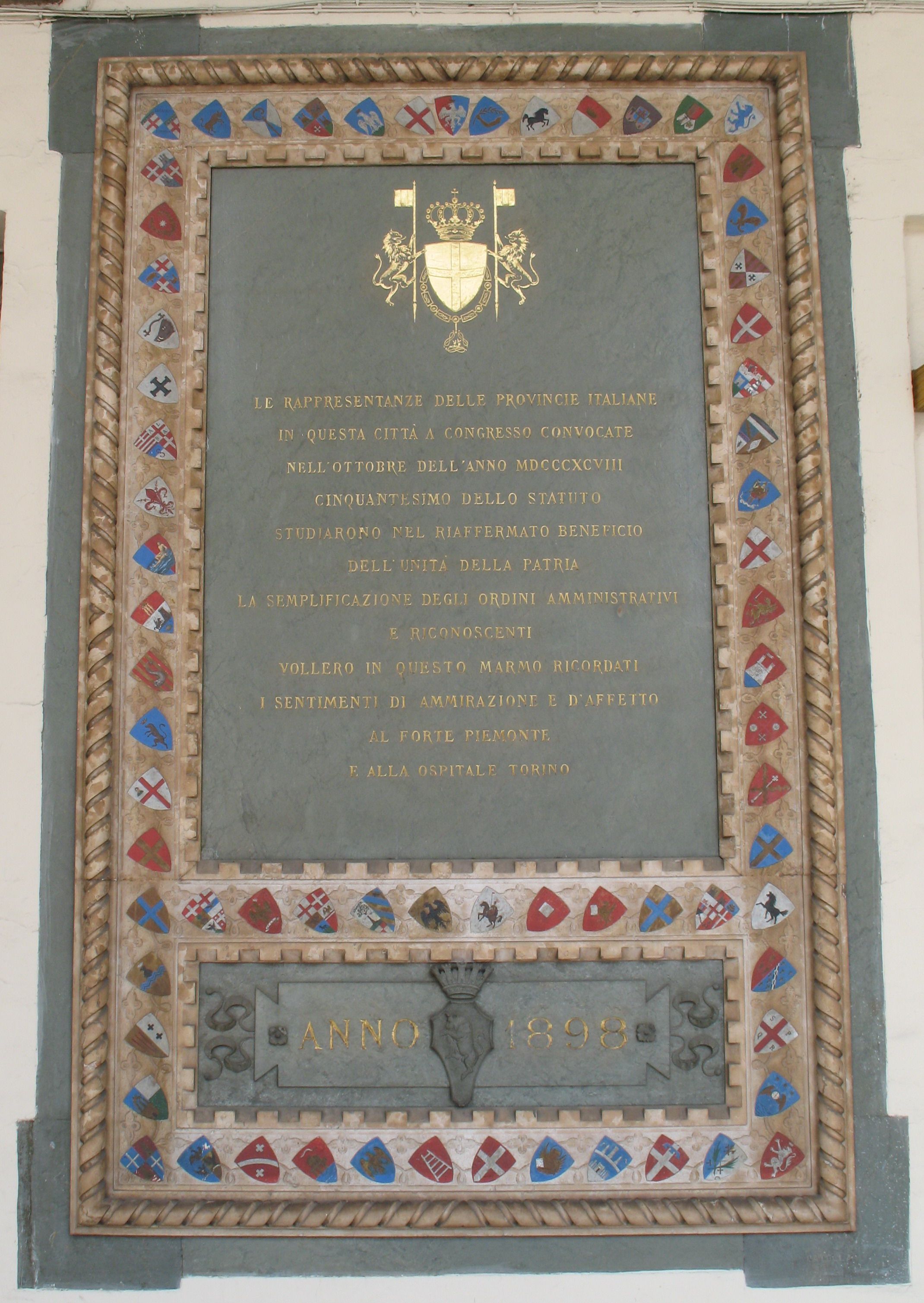 Lapide commemorativa del congresso delle province italiane del 1898, si trova a Torino presso il Palazzo Reale di Torino sotto i portici di Piazza Castello. Riporta tutti gli stemmi delle province esistenti all'epoca e, in basso al centro, quello di Torino, città che ospitò il congresso.